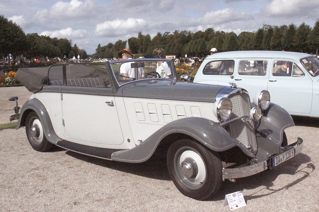 Röhr 8 Typ F Cabriolet 4-Fenster (1934) Hans Gustav Röhr gründete am 30. Oktober 1926 zusammen mit Hugo Greffenius, Hauptaktionär der MIAG, die Röhr Auto AG. Zusammen hatten beide ein Startkapital von ca. 500.000 Reichsmark. Im selben Jahr wurde das Gelände der Falcon Automobilwerke in Ober-Ramstadt übernommen. Im Herbst 1927 begann die Produktion des Röhr 8, dem der 1928 in Berlin erstmals der Öffentlichkeit vorgestellte Röhr 8 Typ R folgte. Das Fahrzeug war ein wirtschaftlicher Erfolg und man erreichte im selben Jahr einen Auftragsbestand von 2.200 Röhr-Wagen. Röhr beschäftigte 1929 etwa 800 Mitarbeiter. 1930 während der Weltwirtschaftskrise, mussten die „Röhr Auto AG“ Konkurs anmelden. Anfang 1931 stoppte die Produktion vorerst. Die Röhr Auto AG wurde mit Einverständnis der Gläubiger vom schweizerischen Röhr-Generalvertreter Joos Andreas Heintz übernommen. Unter dem Namen Neue Röhr AG wurde im April 1931 die Produktion wieder aufgenommen, Hans Gustav Röhr verließ sein Unternehmen jedoch. Im Frühjahr 1932 wurde als neues Modell der Röhr Junior vorgestellt. Die Machtergreifung der Nationalsozialisten und deren anschließende Repressalien gegenüber jüdischem Kapital schwächten die Röhr AG nachhaltig. Im Dezember 1934 musste deswegen erneut Konkurs angemeldet werden. Die Werkstätten in Ober-Ramstadt wurden im Frühjahr 1935 geschlossen. Sämtliche Fertigungsunterlagen und Werkzeuge standen zum Verkauf. Stoewer sicherte sich die Produktionsrechte am Röhr Junior und fertigte ihn als Stoewer Greif Junior bis 1939. Der Rest ging zunächst an die Gesellschaft für die Verwertung von Industrieanlagen mbH, die bis 1936 noch einige Röhr F bauen ließ. Schließlich pachtete die Noll-Monnard KG die Räume der vormaligen Reparaturabteilung und überarbeitete den Röhr F nochmals, jedoch ohne die Produktion beginnen zu können. Im Sommer 1937 wurden die Bemühungen endgültig eingestellt. Quelle